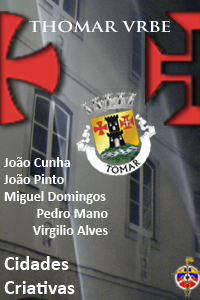 Cartaz do projecto Thomar Vrbe